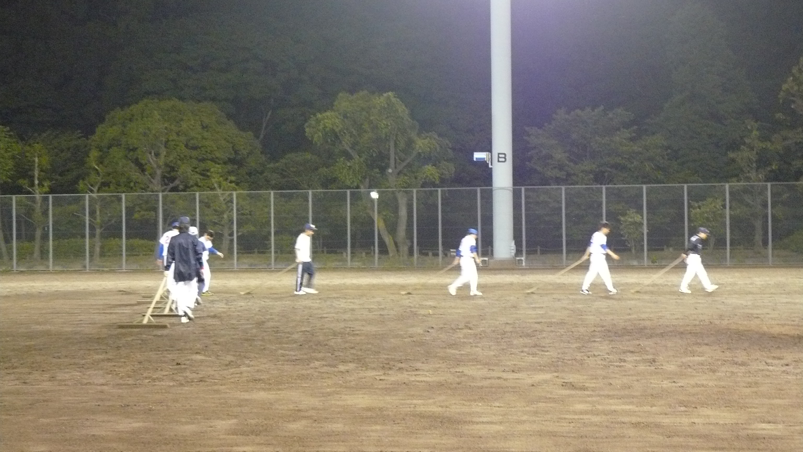 熱田神宮公園球技場